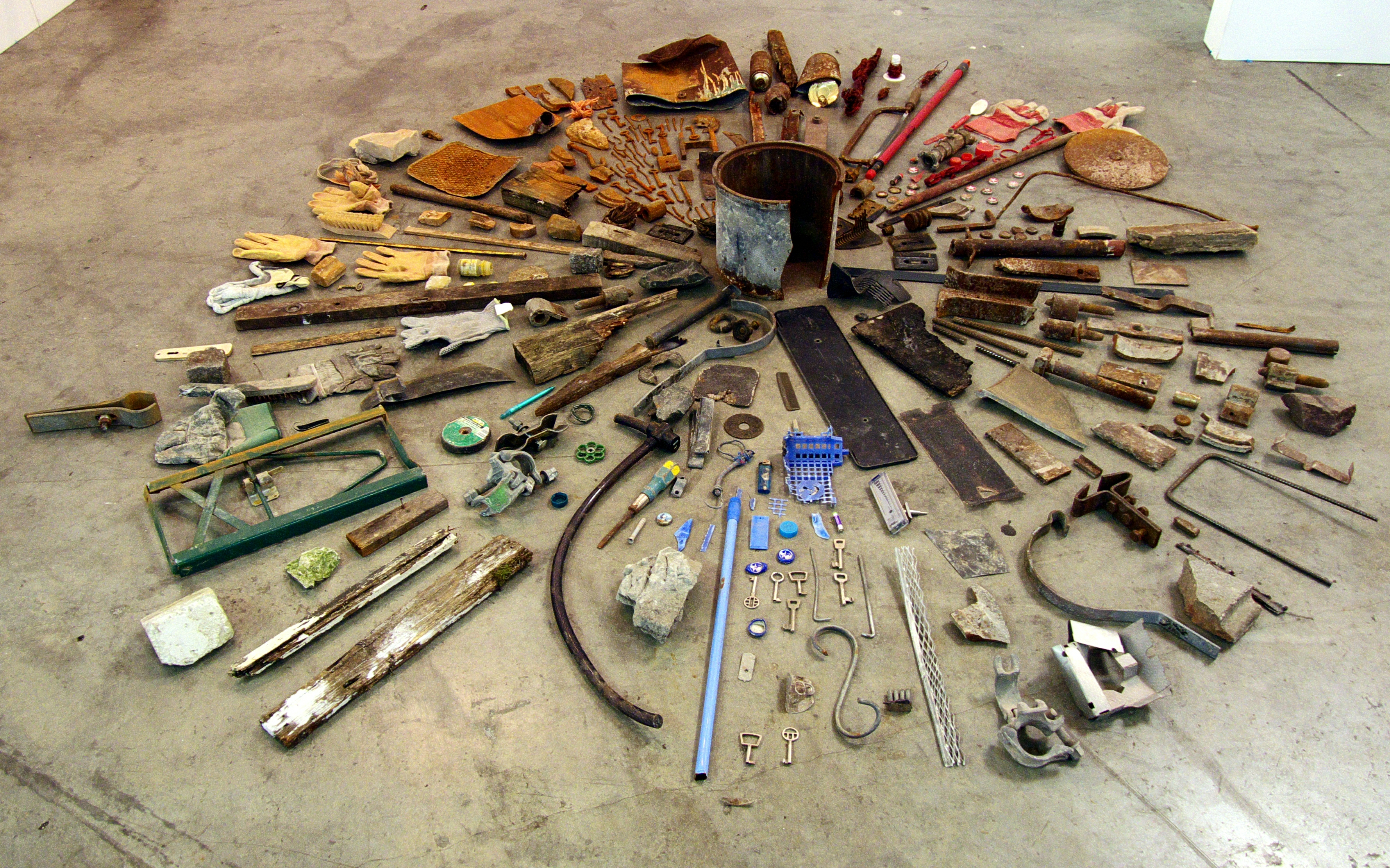 Arturo Hernández Alcázar - Artissima 2012